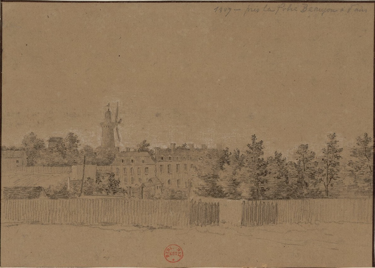 Vue de la Folie Beaujon : les communs, le moulin-joli. 1807. Dessin à la mine de plomb et rehauts de craie sur papier brun ; 12,7 x 17,7 cm. Paris, Bibliothèque nationale de France, ancienne coll. Destailleur (Référence bibliographique : Destailleur Paris, t. 6, 1322)